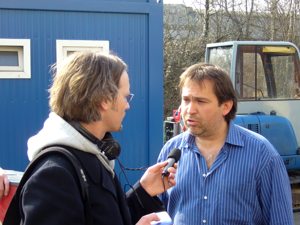 Der Regisseur Adnan G. Köse im Interview.